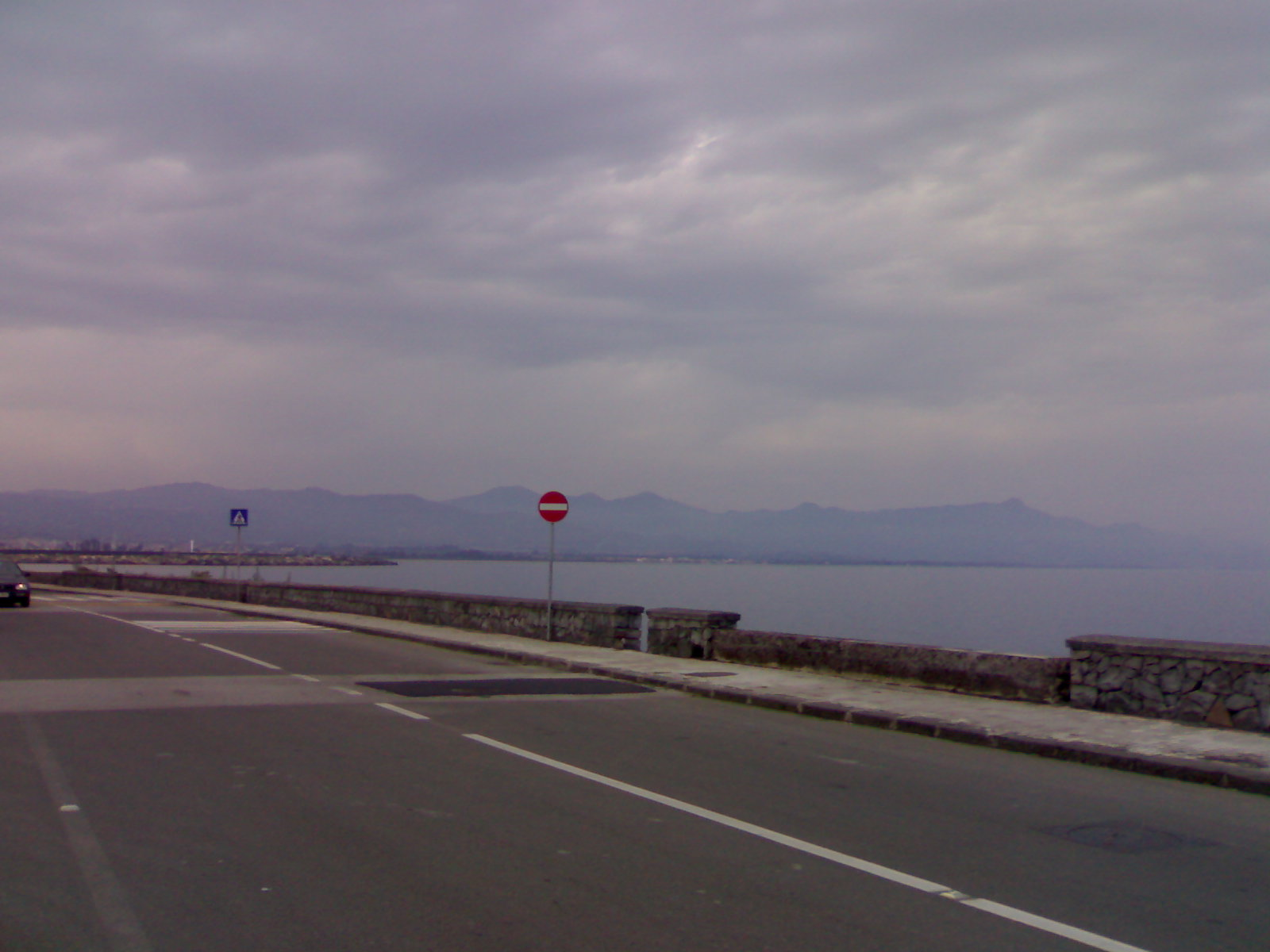 Lungomare Edoardo Pantano, Riposto, Sicily, Italy; 2007